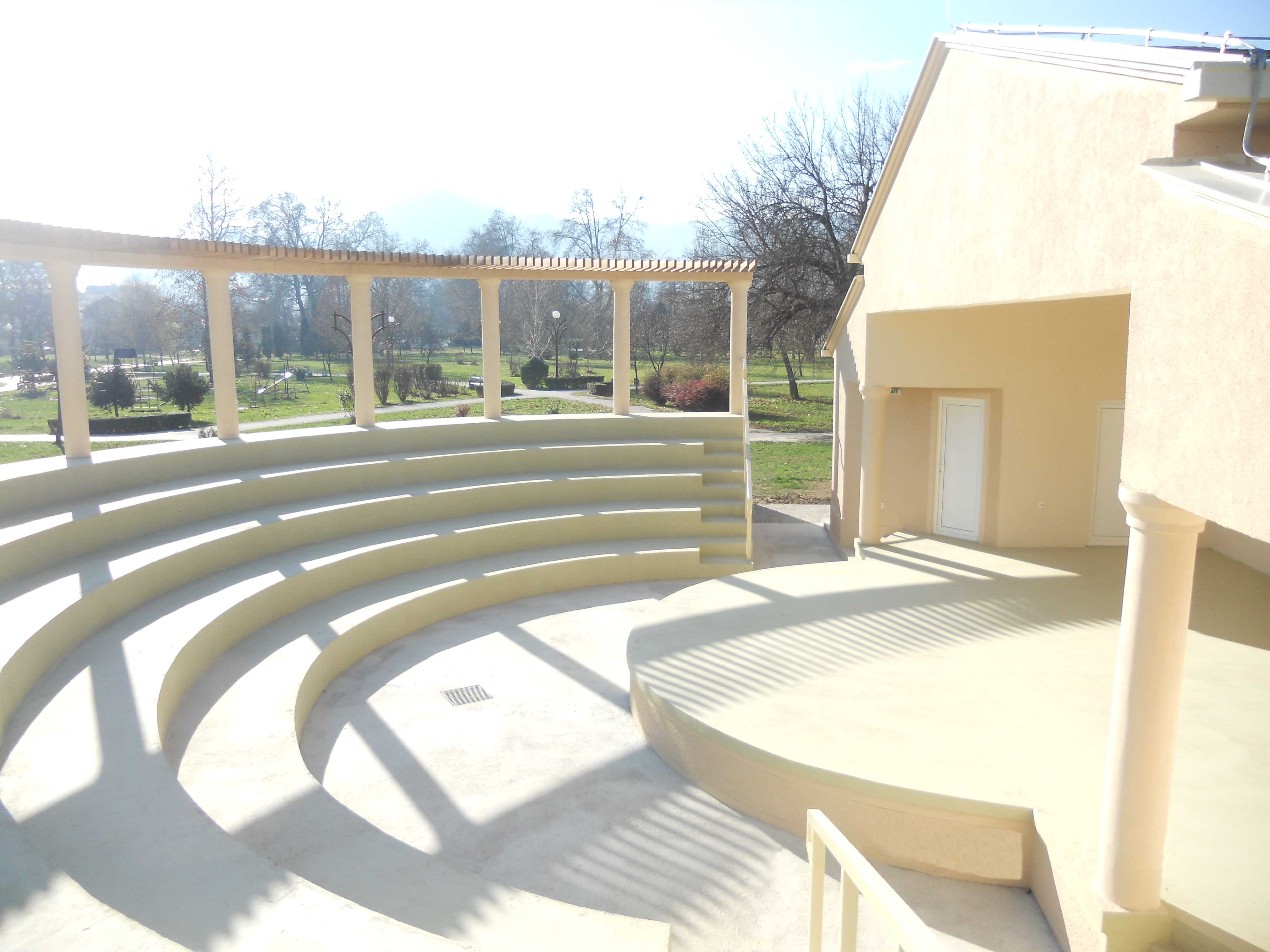 Амфитеатар во Струмица